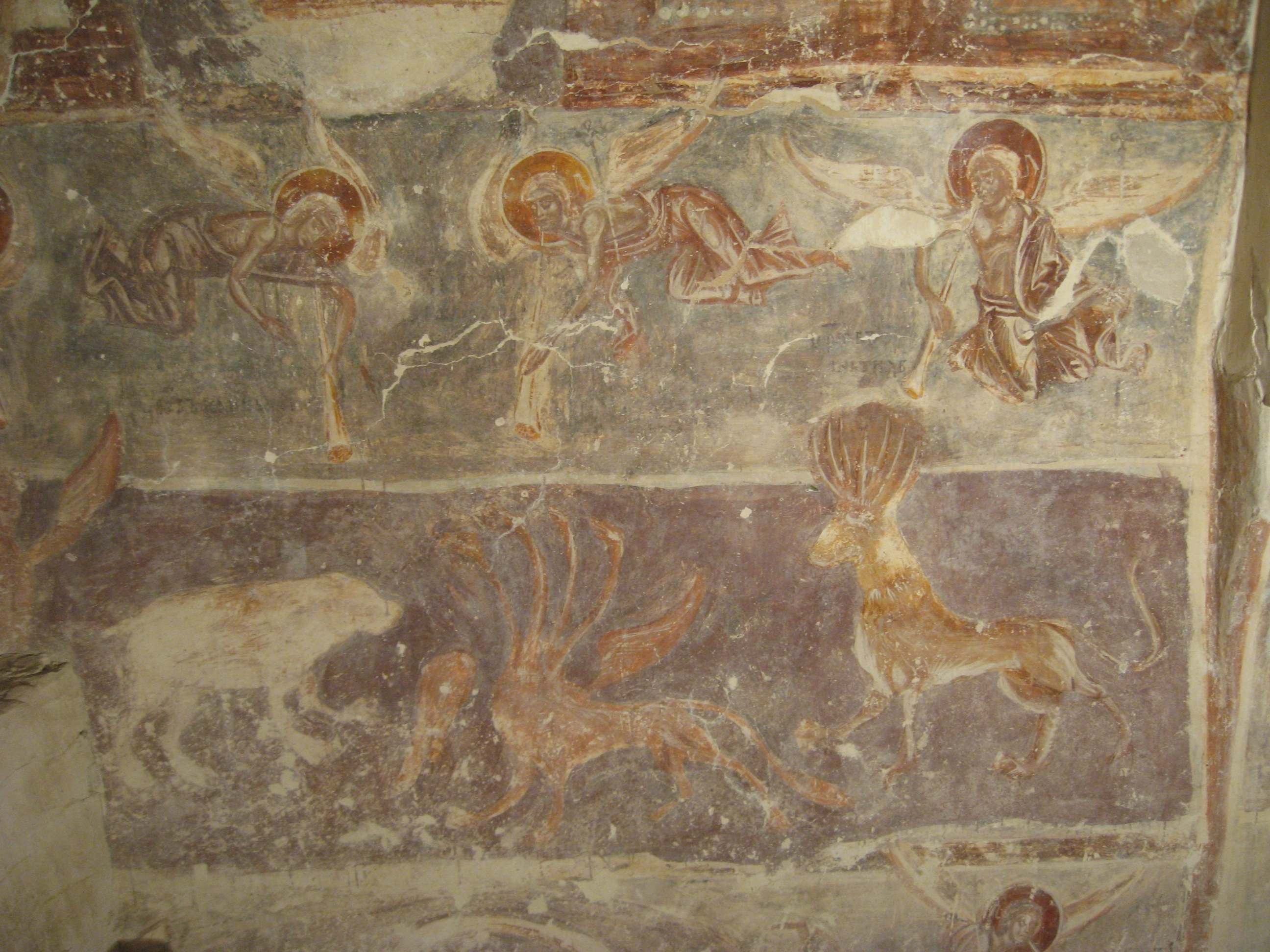 Фреска собора Снетогорского монастыря. 1313 год.